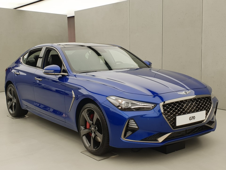 제네시스 G70 정측면